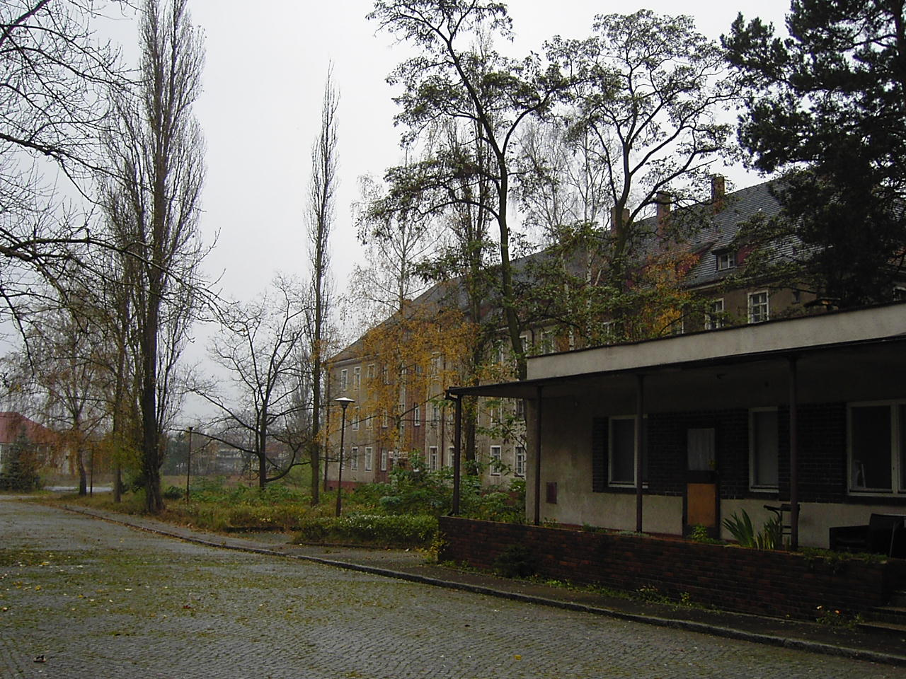 Sztab 5 SDPanc z Gubina . Zdjęcie późniejsze